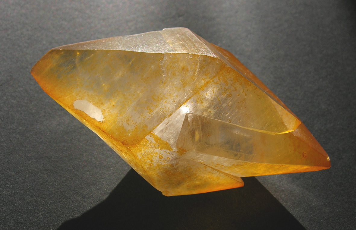 Macle de calcite